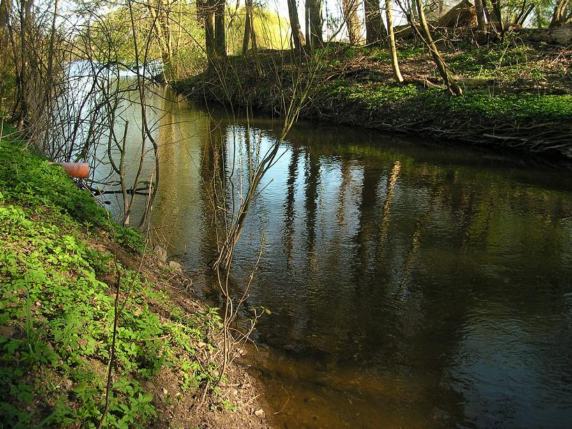 Die Eider nach Austritt aus dem Schulensee, Grenze zwischen Molfsee (Kreis Rendsburg-Eckernförde) und Kiel